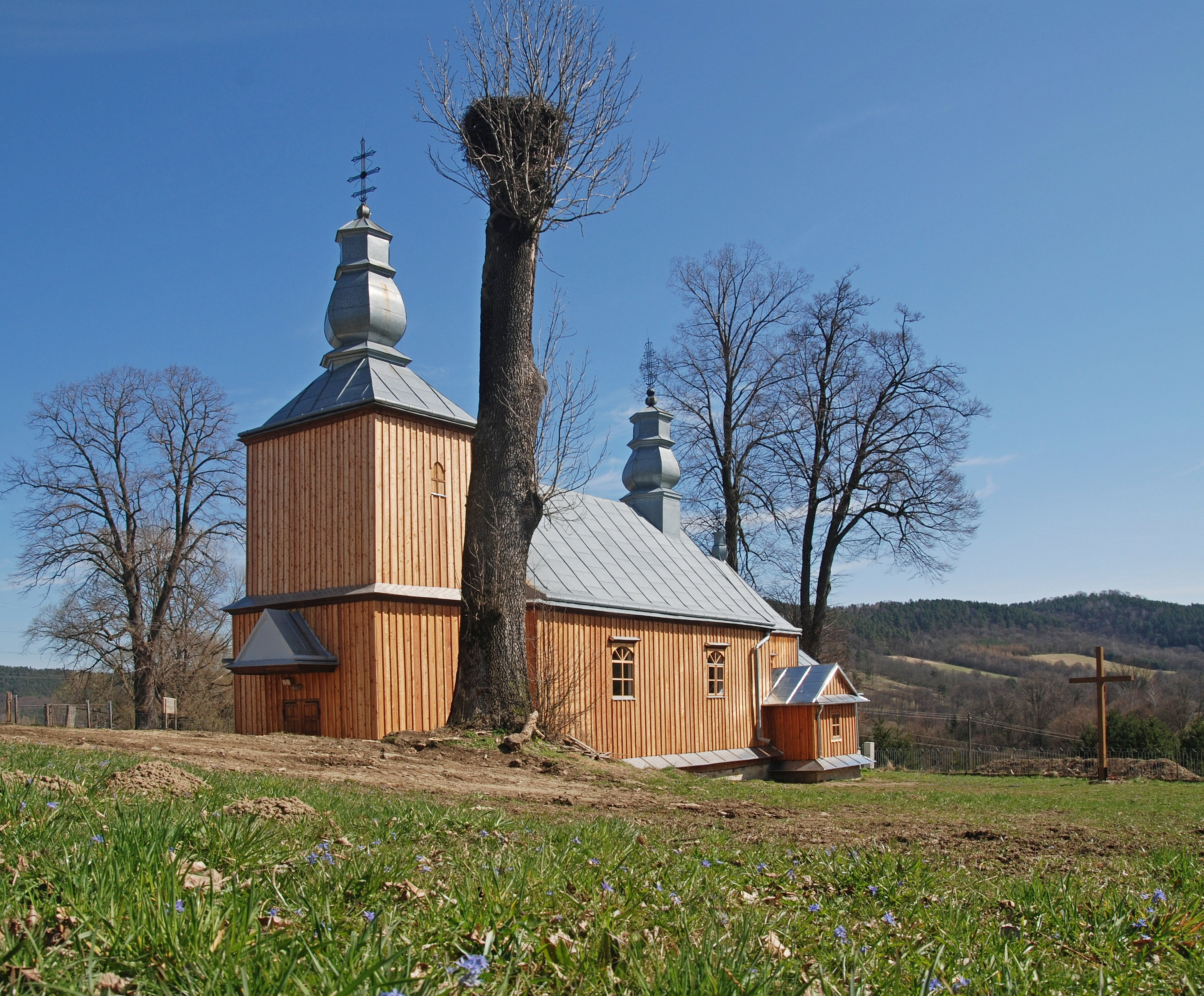 wieś Siemuszowa